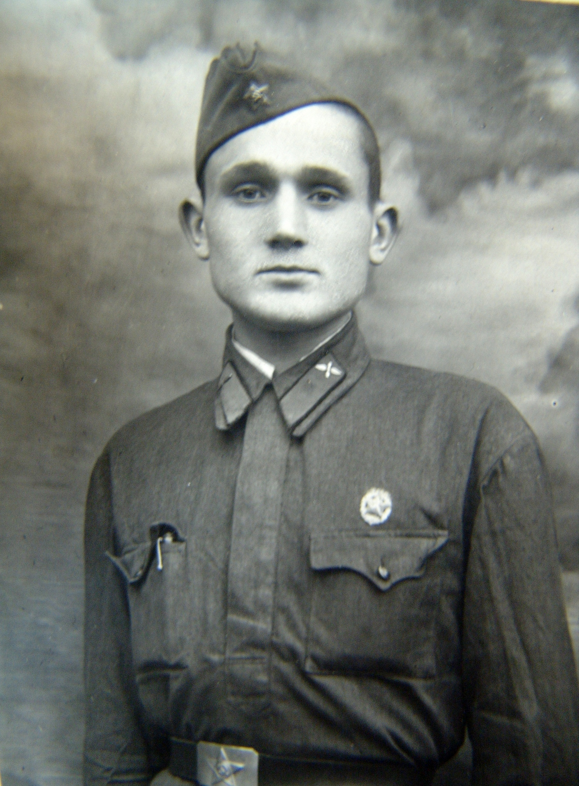 Гусев Анатолий Дмитриевич (1923-1973). Фото 1941 года. Курсант летного училища (Алатырский аэроклуб) г. Алатырь.